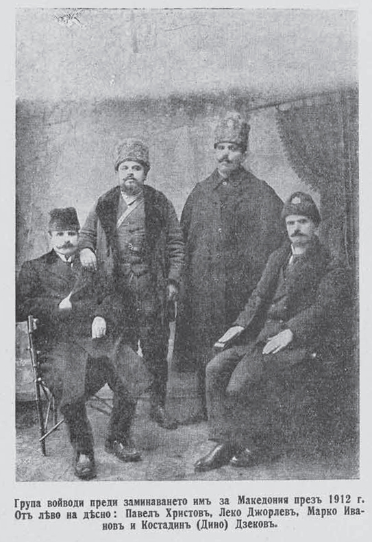 Pavel Hristov Leko Dzhorlev Marko Ivanov Kosta Dzekov